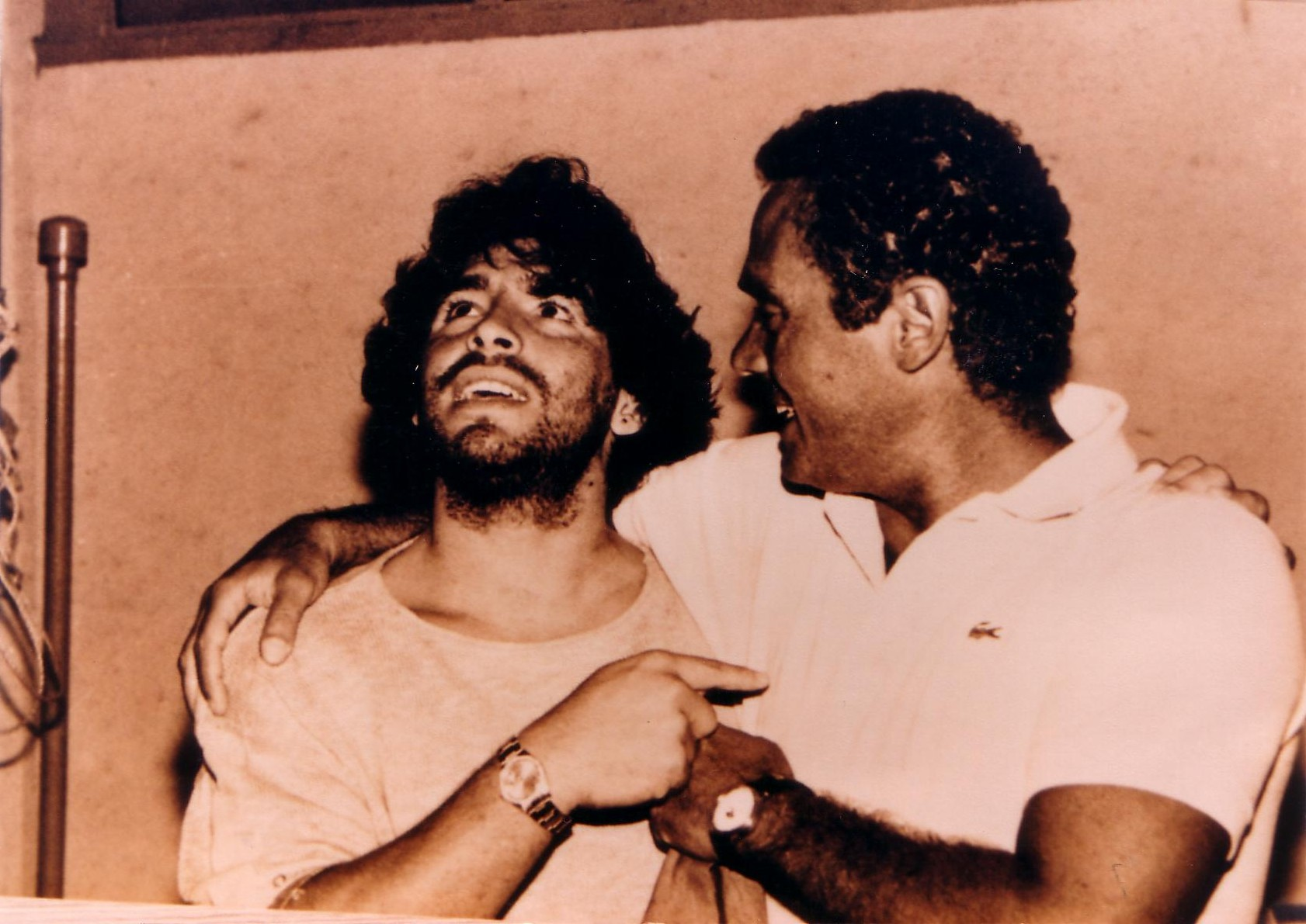 foto con presente Diego Armando Maradona e Giovanni Di Marzio, osservatore che scoprì el Pibe quando aveva 17 anni